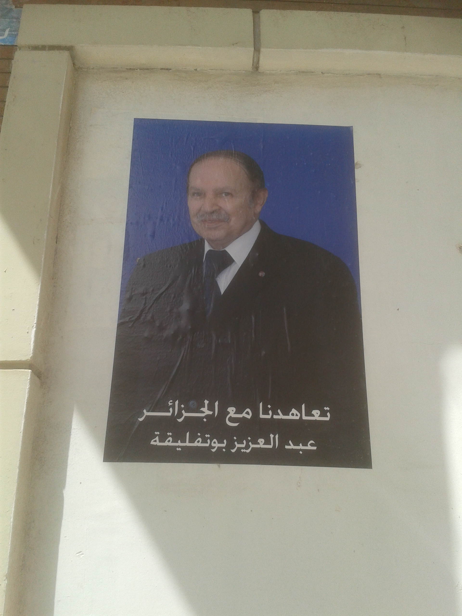 Affiche du Candidat A. Bouteflika, Election Presidentielle 2014, Oran, Algeria